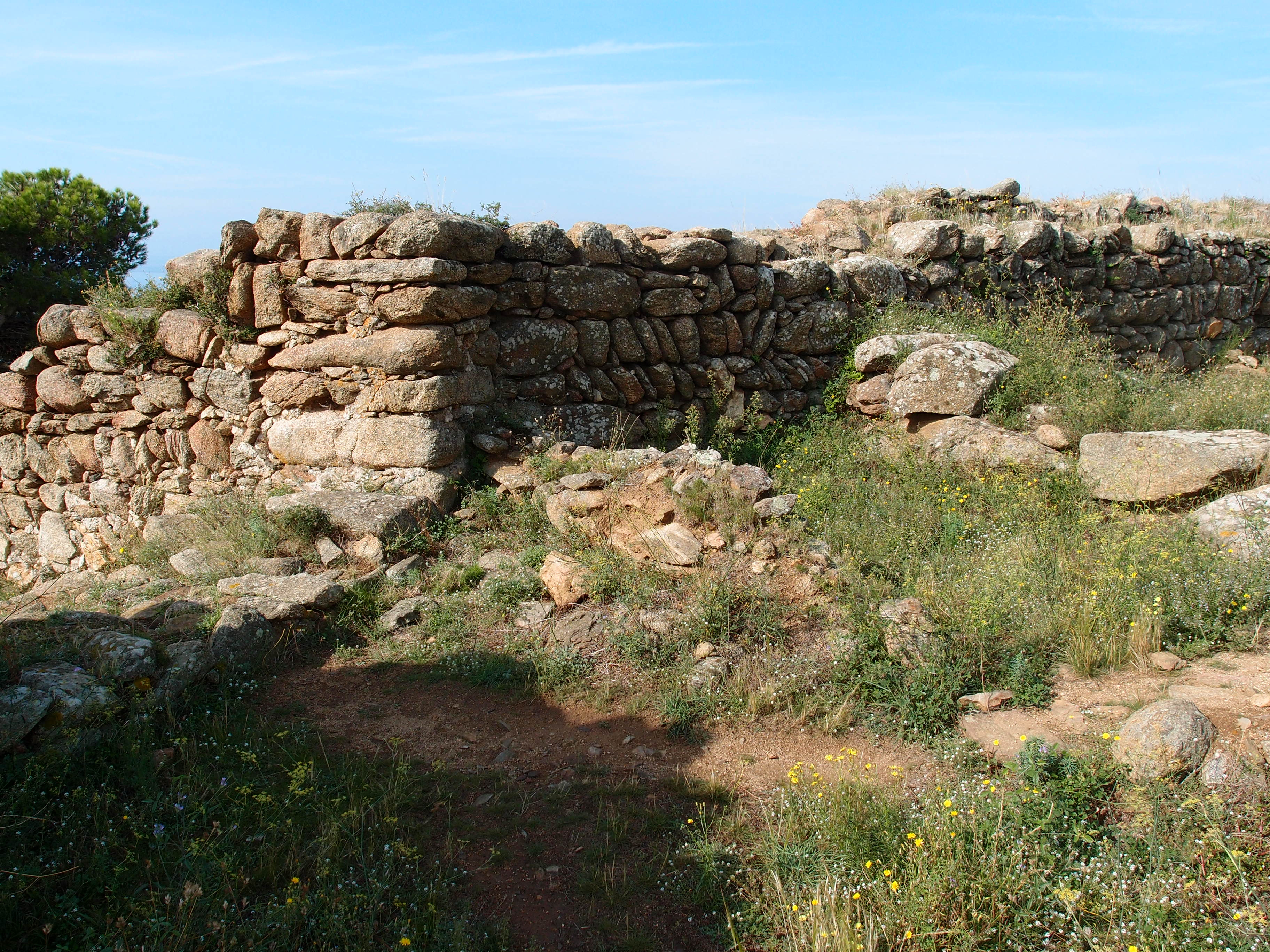 Castrum visigotic Roses (westgotisches Kastelle in Roses) Datum: 16.09.2014 Urheber: M. Pfeiffer alias Gordito1869 Quelle: privates Fotoarchiv des Urhebers